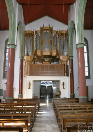 Blick auf die Orgel in der Kirche St. Silvester zu Erle im Westmünsterland